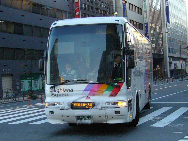 登録番号 長野200か・459 川中島バス所属 アルペン長野号用 2005年12月19日 阪急三番街付近にて撮影